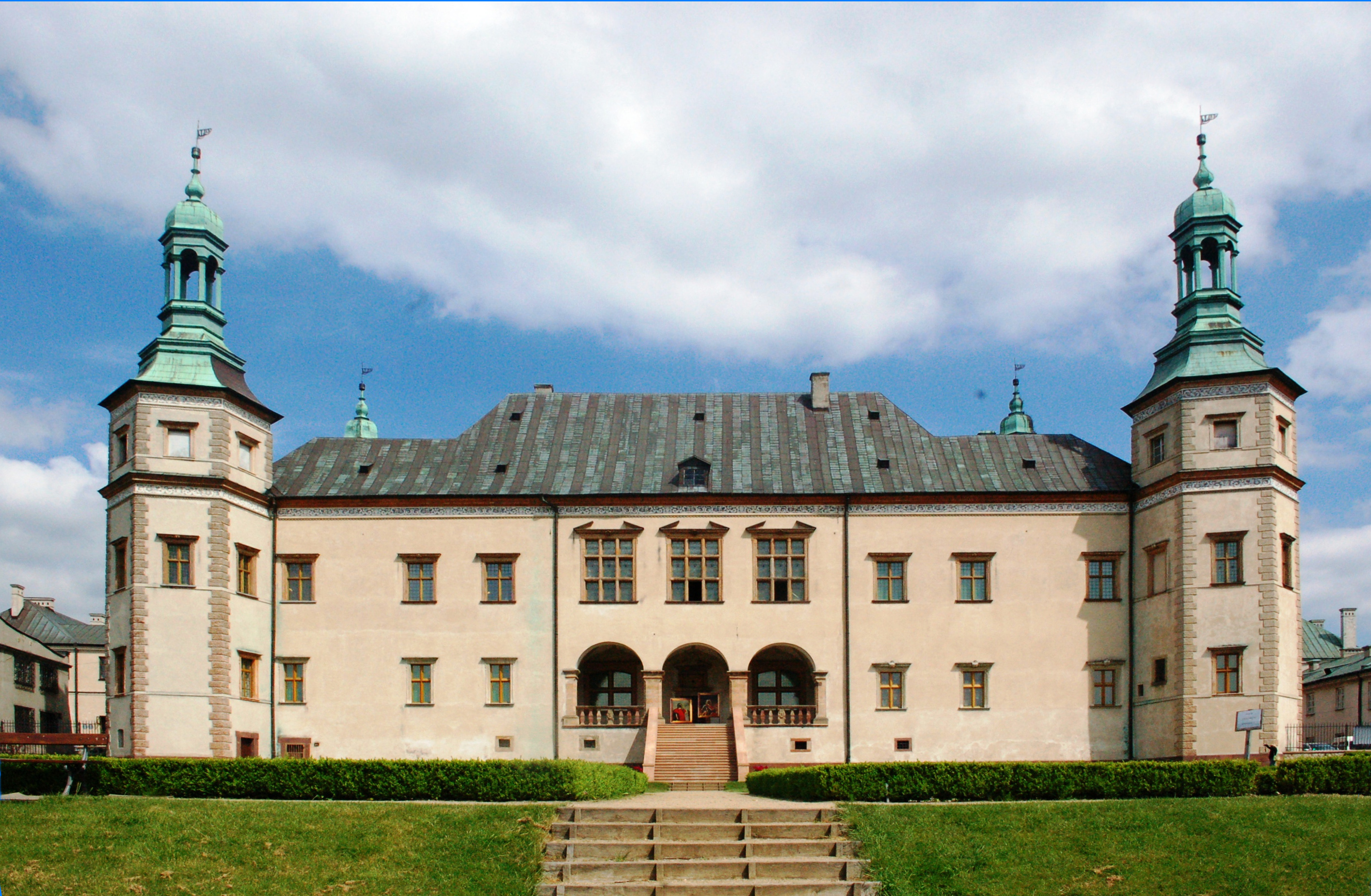 Ehemaliger Bischofspalast in Kielce